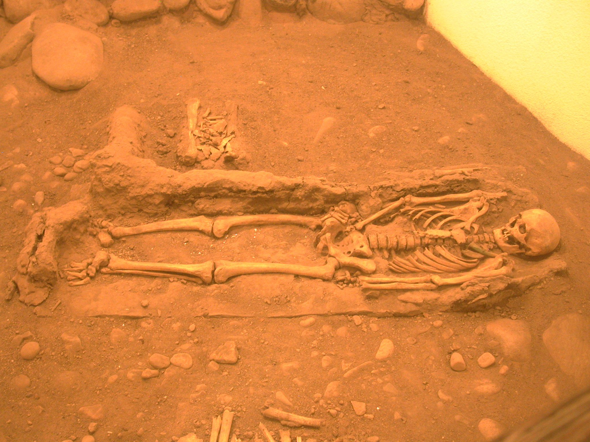 Eusebio Kino's mortal remains